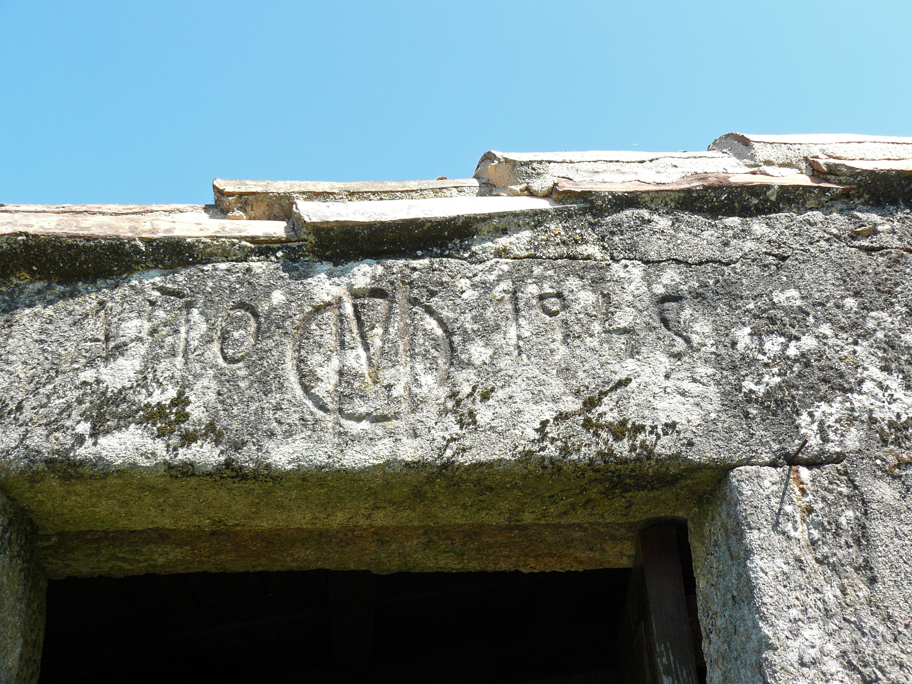 Sinais de canteiro muíños Folón